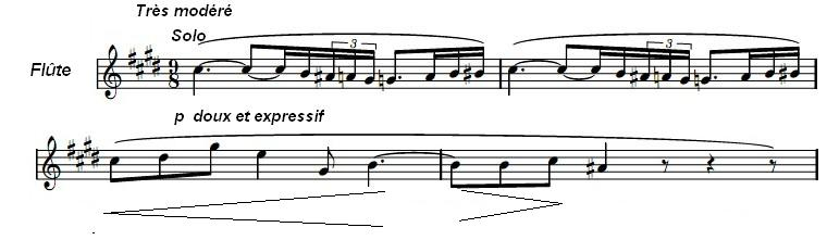 Début de l'après midi d'un faune de Claude Debussy